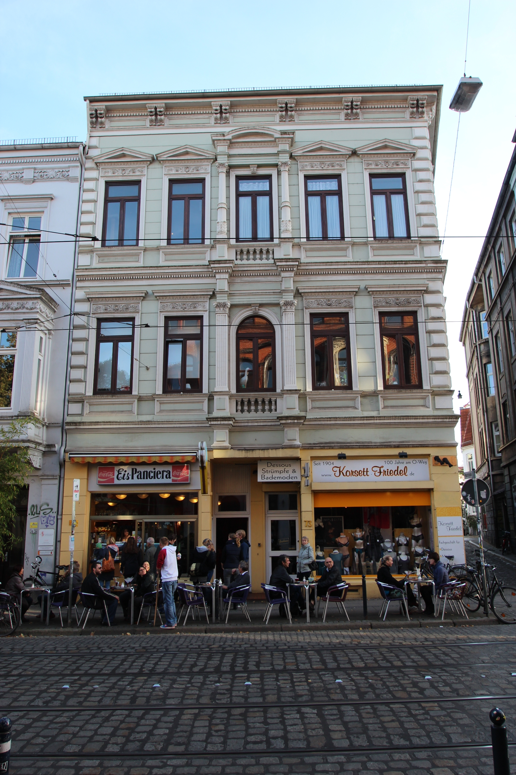 Wohnhaus in Bremen, Ostertorsteinweg 73Das abgebildete Objekt ist ein geschütztes Kulturdenkmal in der Freien Hansestadt Bremen, mit der Nr. 0974 beim Landesamt für Denkmalpflege registriert.